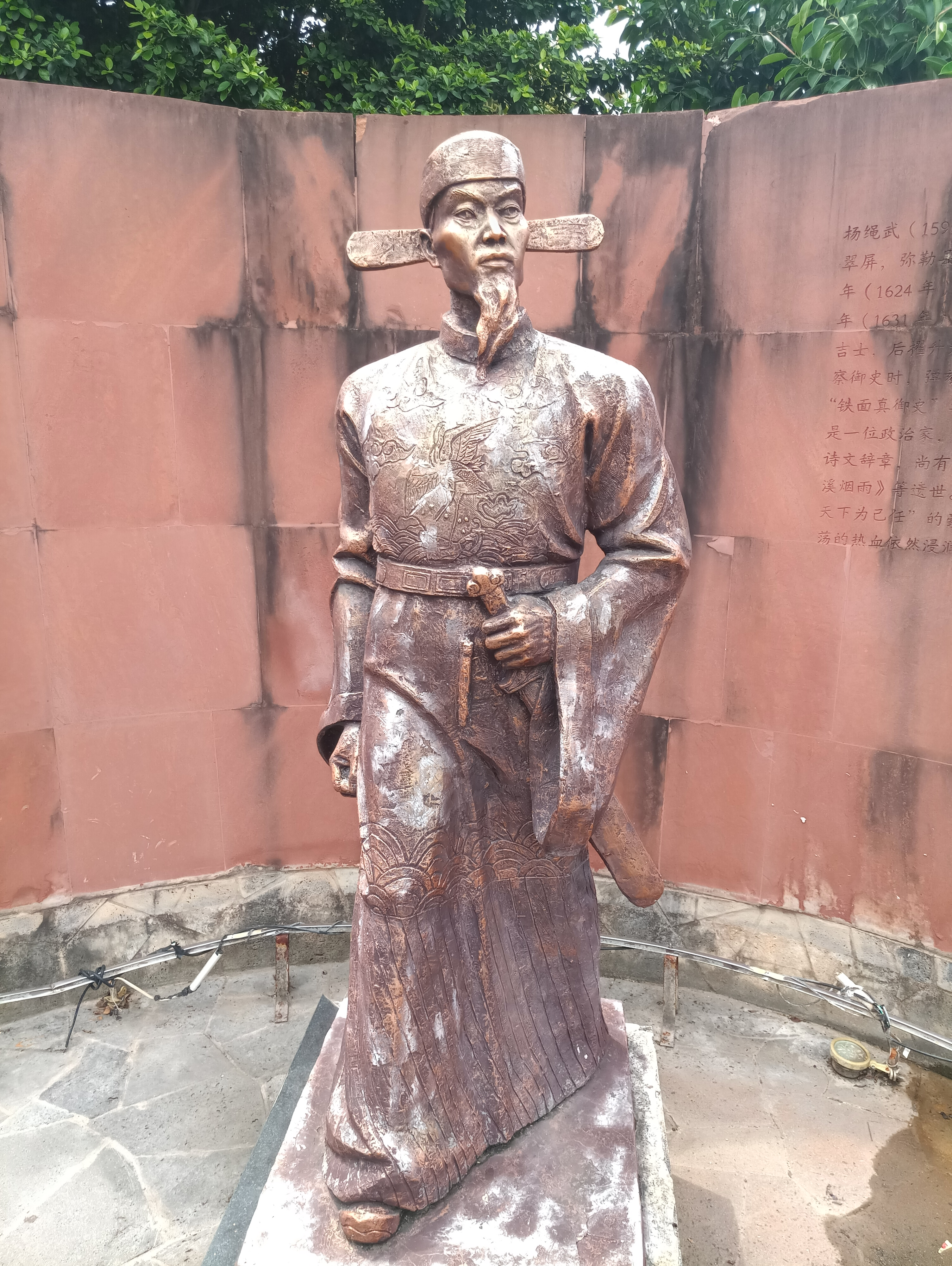 中文（中国大陆）: 弥勒湖泉名人文化园-杨绳武像